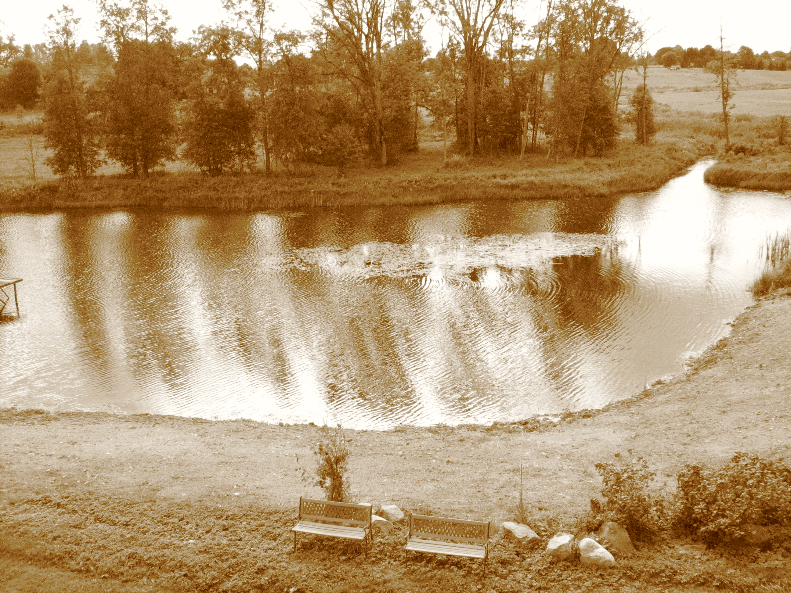 Akmenos dvaro tvenkinys